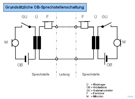 Sprechstellenschaltung für Ortsbatteriebetrieb